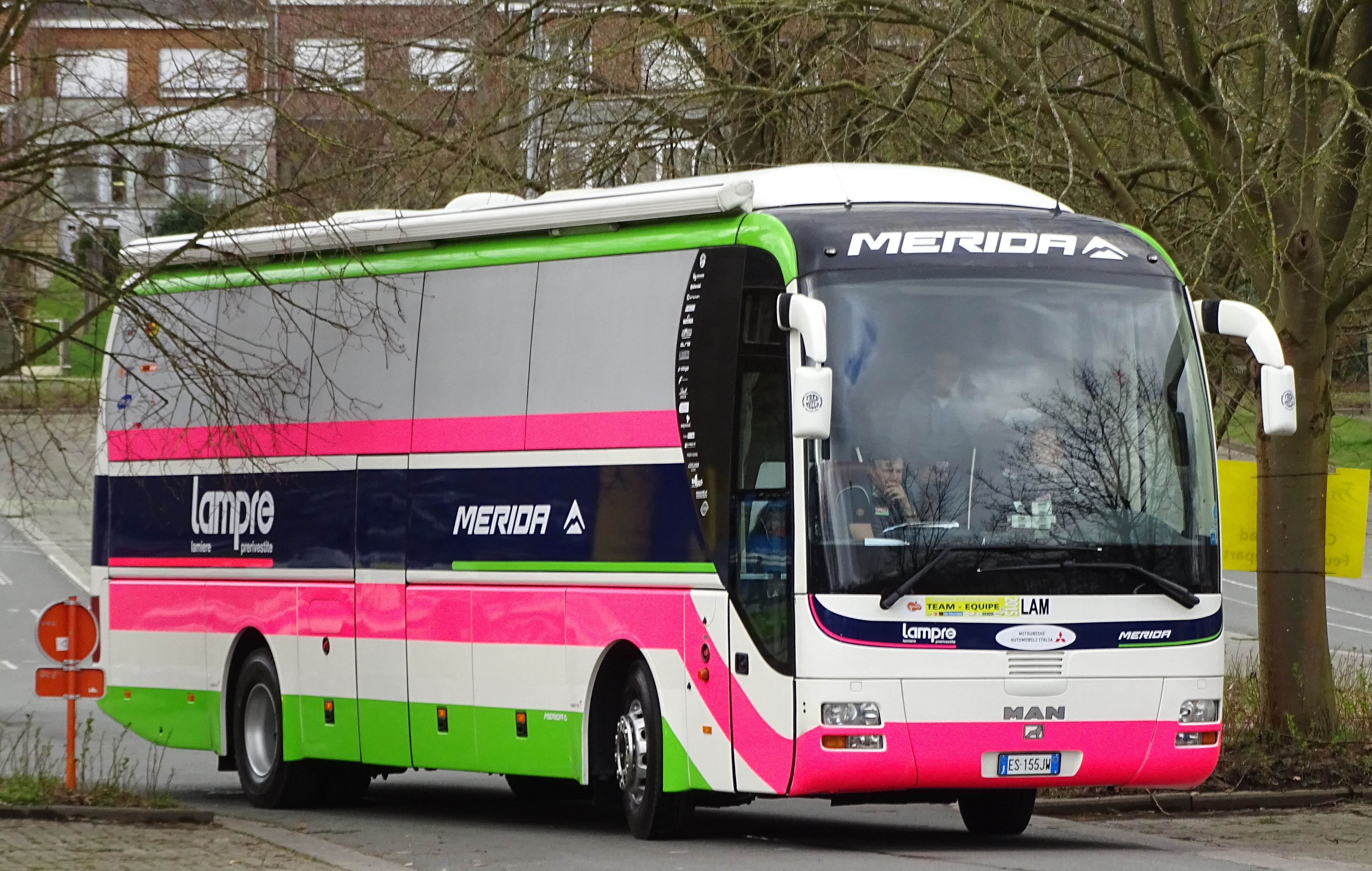 Reportage réalisé le mercredi 1er avril à l'occasion du départ de la deuxième étape des Trois jours de La Panne 2015 à Zottegem, Belgique.